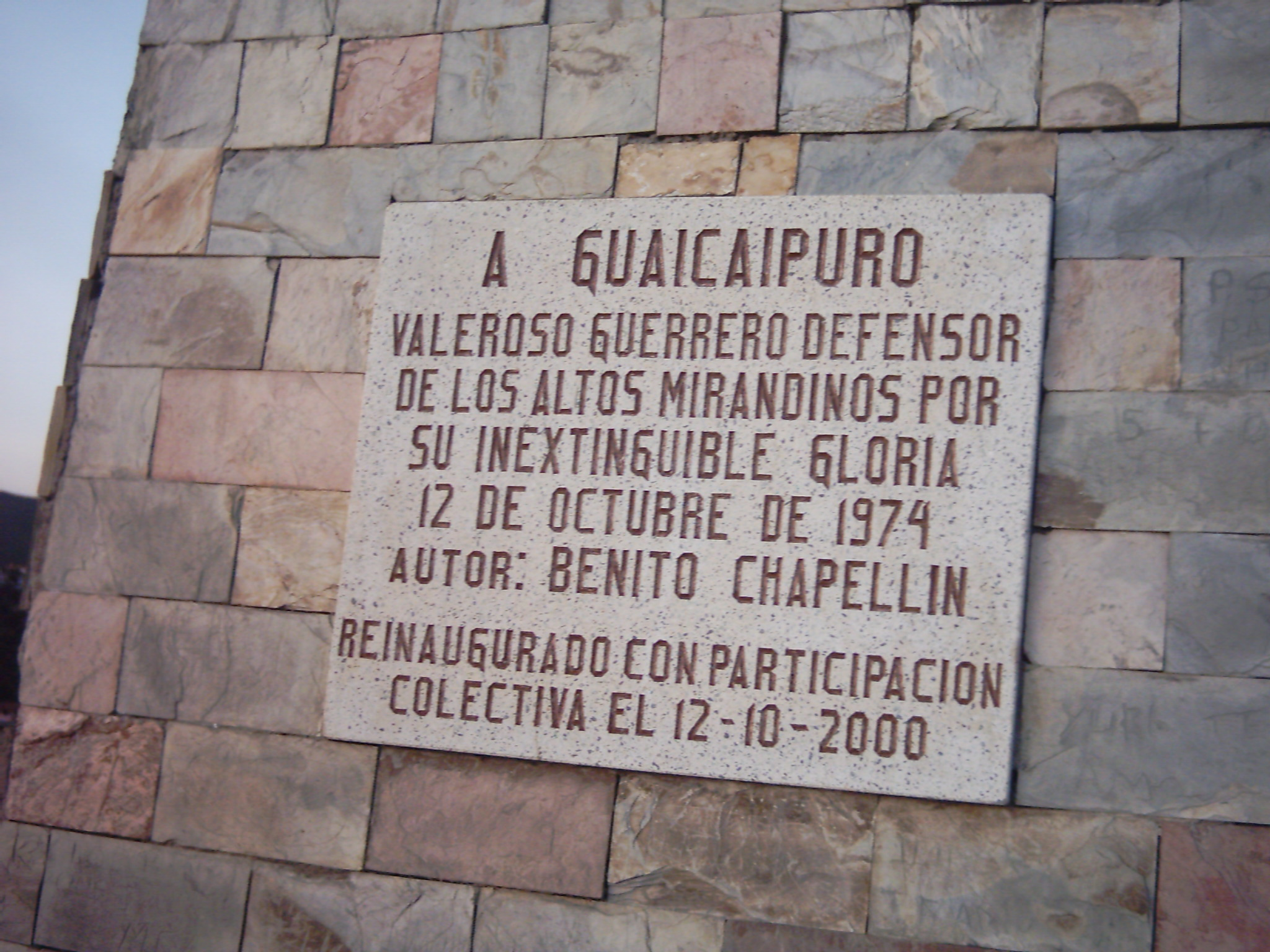 Placa conmemorativa del monumento al Cacique Guaicaipuro en el punto mas alto de la ciudad de Los Teques.